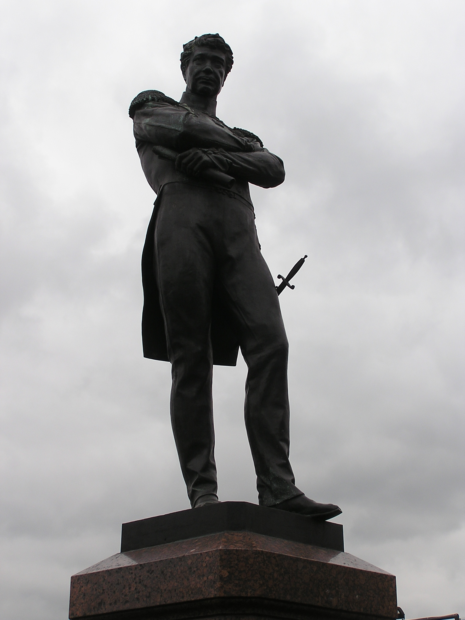 Санкт-Петербург. Памятник Крузенштерну